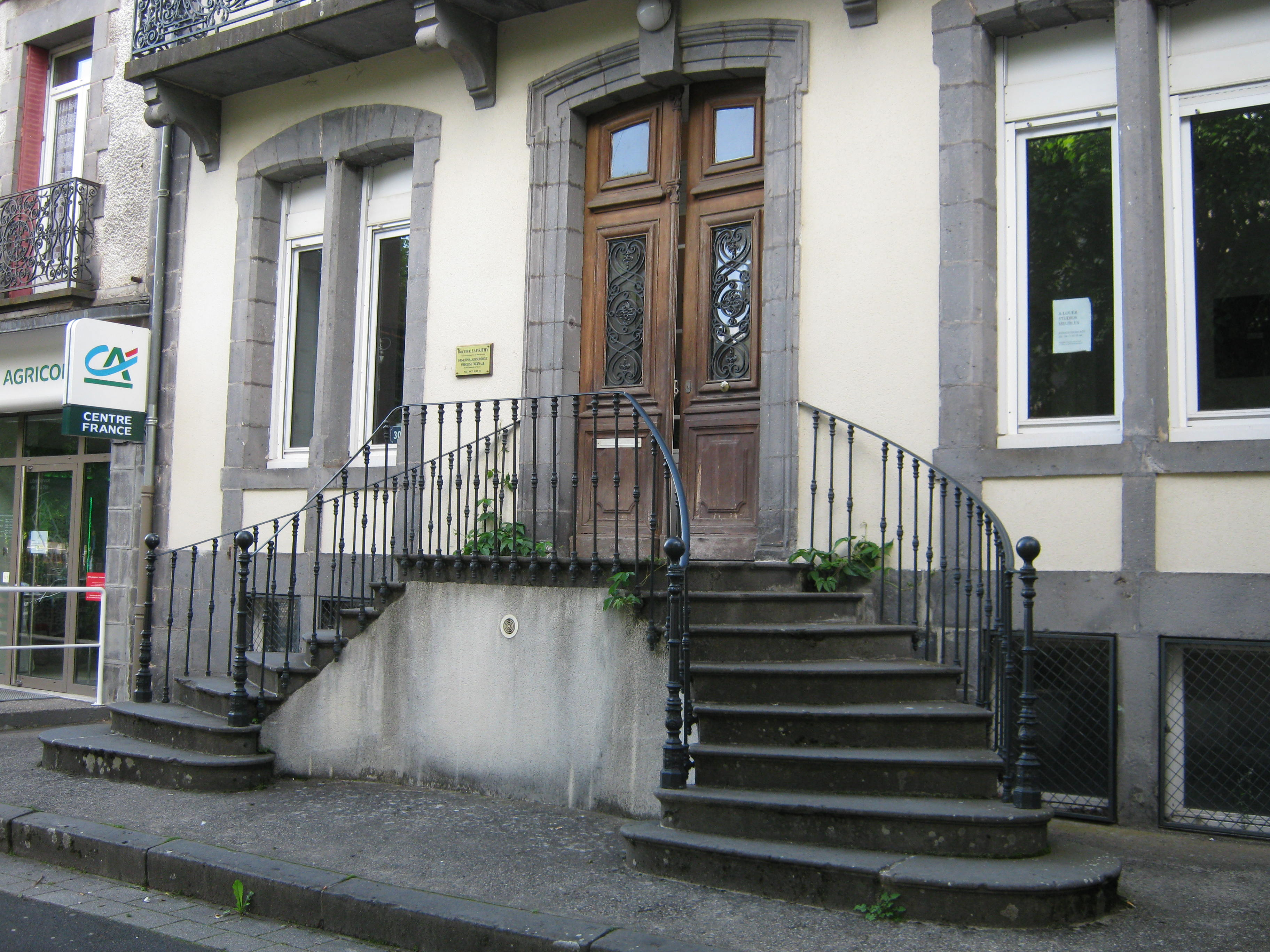 63150 La Bourboule; Haus im Boulevard Georges Clemenceau. Aufnahme von 2016.